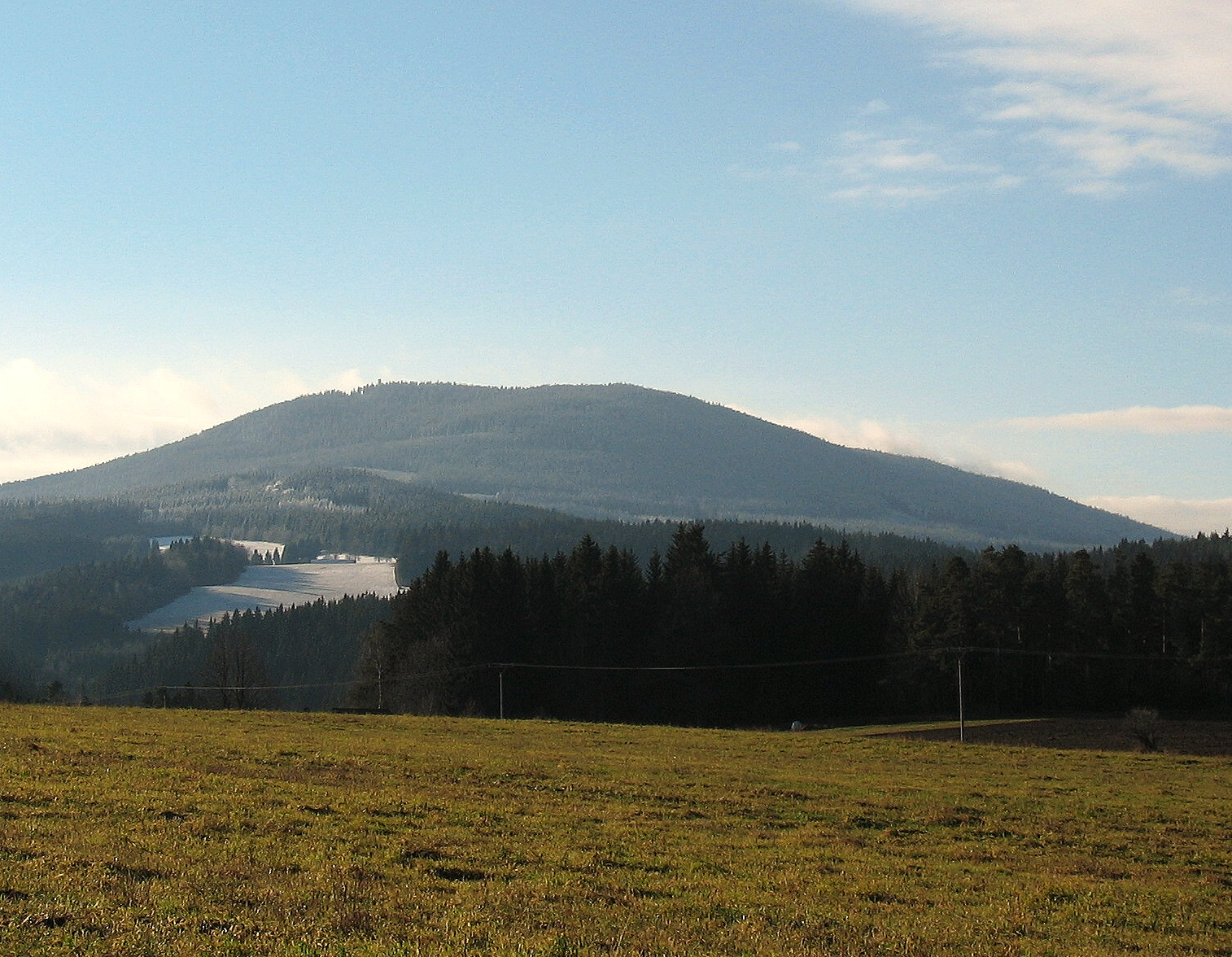 Boubín od Šumavských Hoštic.